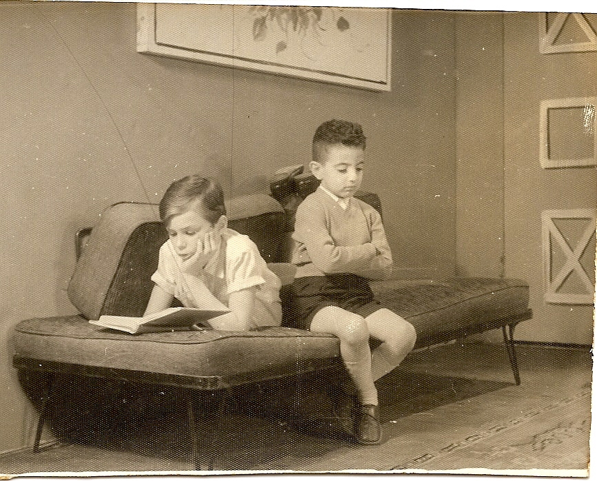 BebecoeFernandoTurmadossete.JPG, James Akel e Marcio Tunkl em gravação da Turma dos Sete